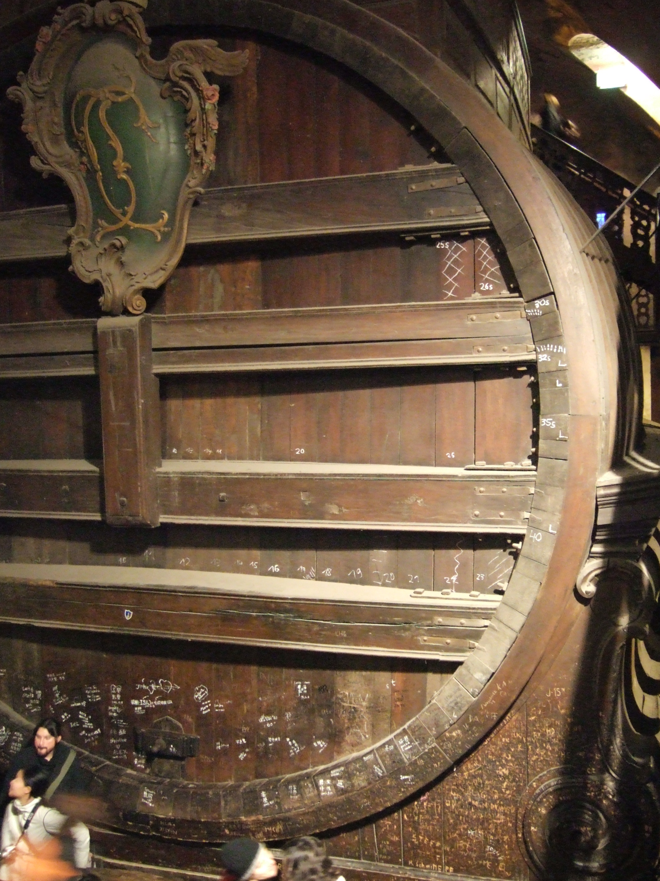 Das Große Fass in Heidelberg. Taken by me.